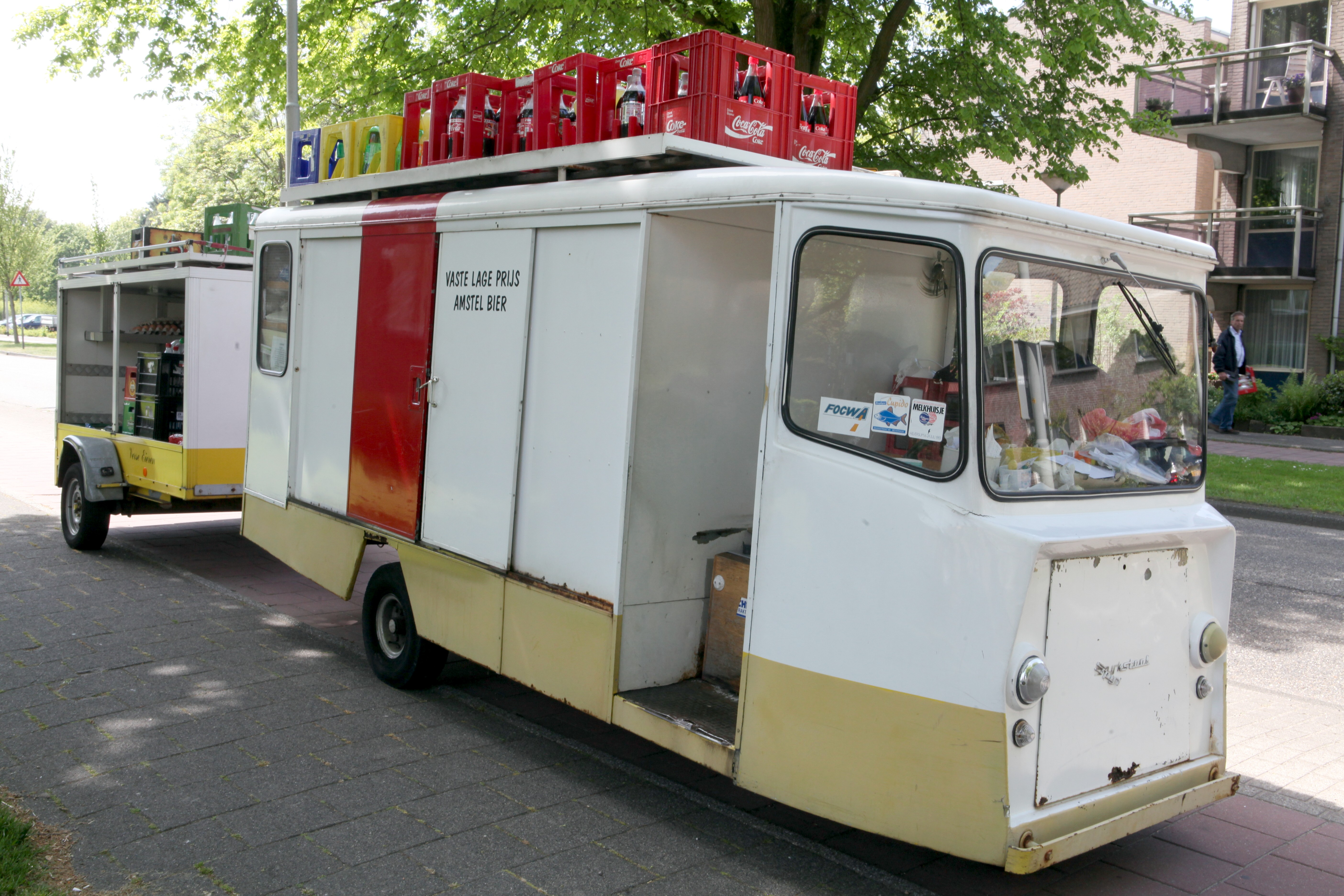 Spijkstaal 1500 from 1971